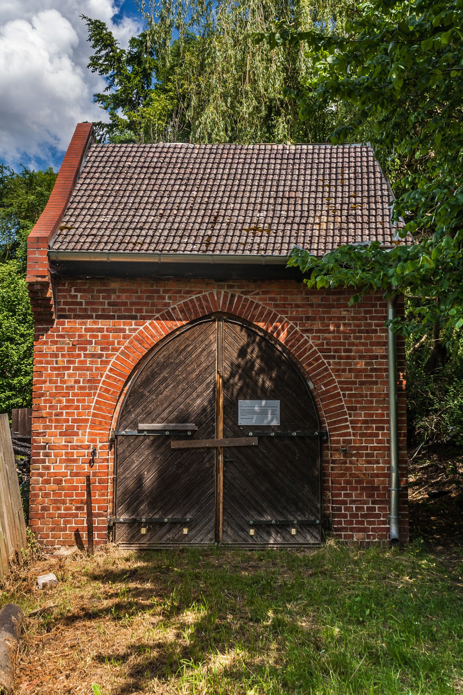 Leichenhalle der jüdischen Synagogengemeinde, auf dem Jüdischen Friedhof